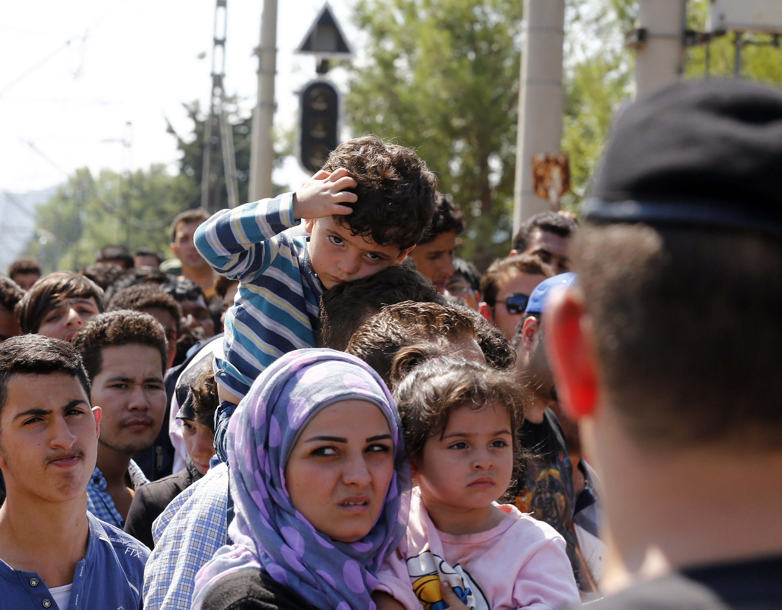 Arbeitsbesuch des Östereichischen Bundesministers Sebastian Kurz in Mazedonien. Besuch der Flüchtlingsströme am Grenzübergang Gevgelija. Mazedonien, 24.08.2015, Foto: Dragan Tatic Flüchtlingsströme am Grenzübergang Gevgelija